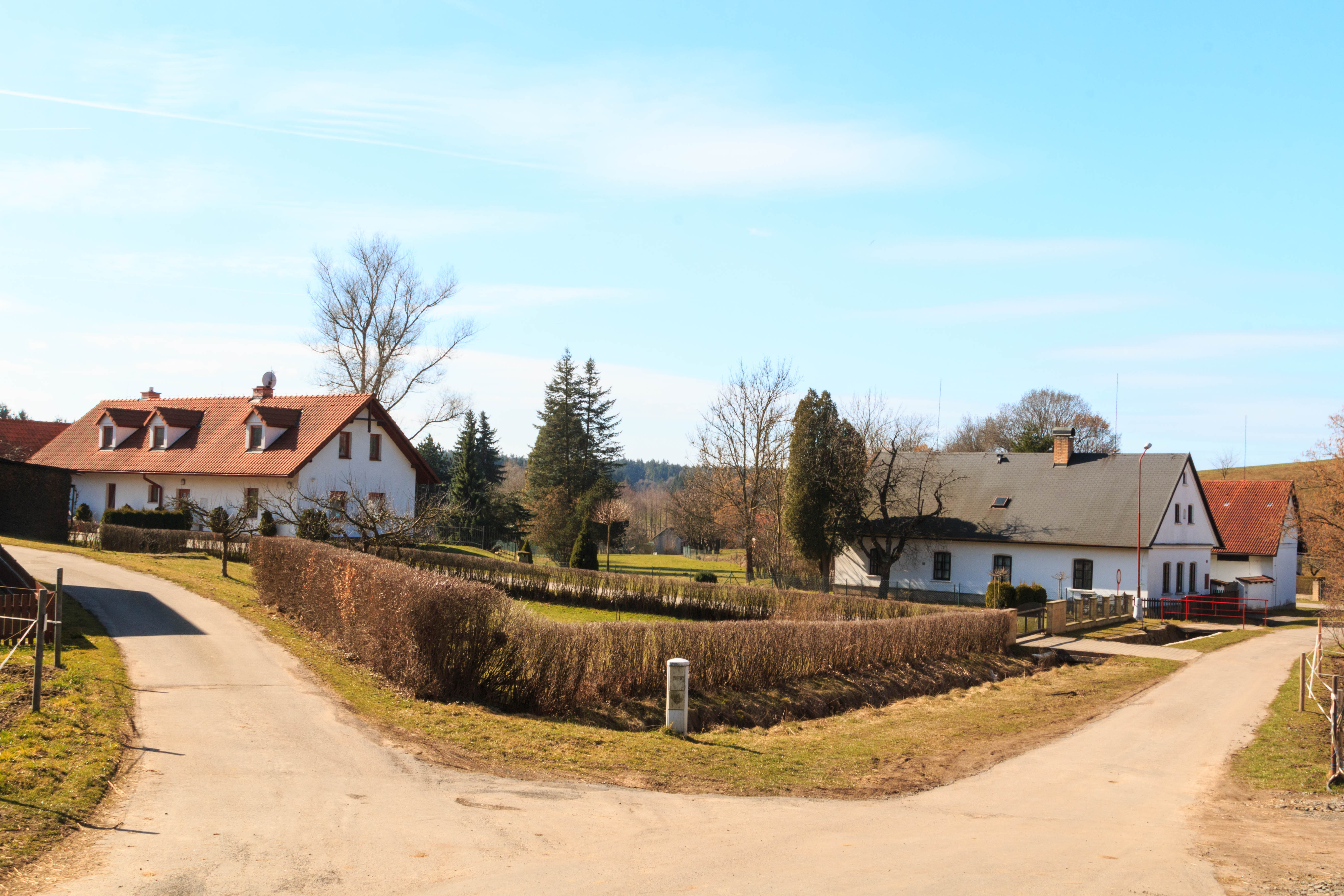 Svídnice - čp. 75